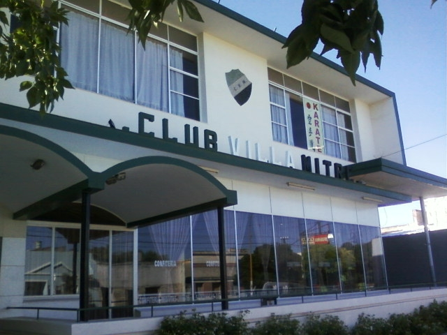 Sede social del club Villa Mitre, Bahía Blanca, Argentina